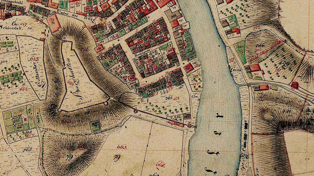 Burghalde; Katastraler Plan der Stadt Kempten aus dem Jahr 1823